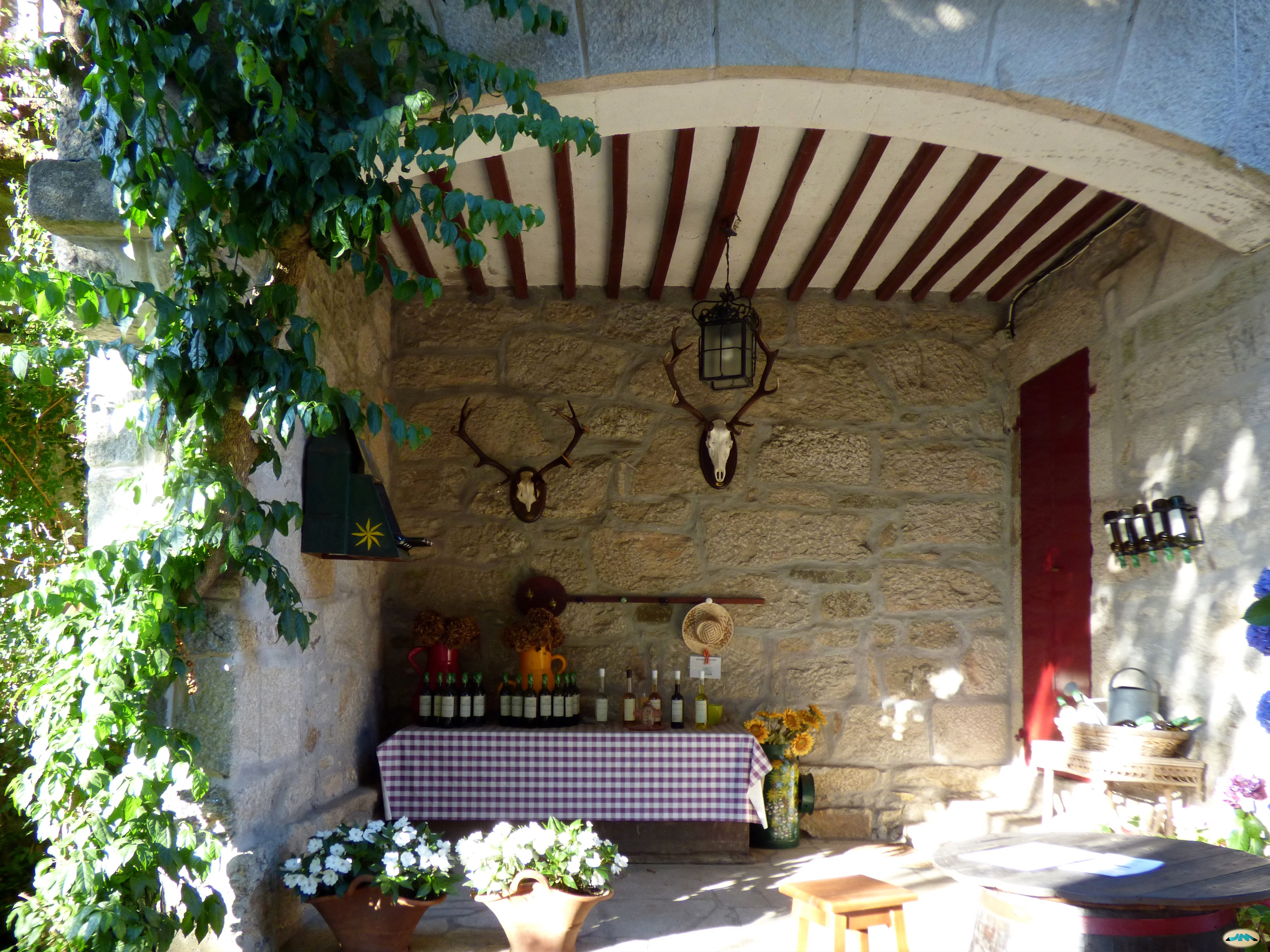 Furancho de Pazo Reboraina en Redondela (Pontevedra)